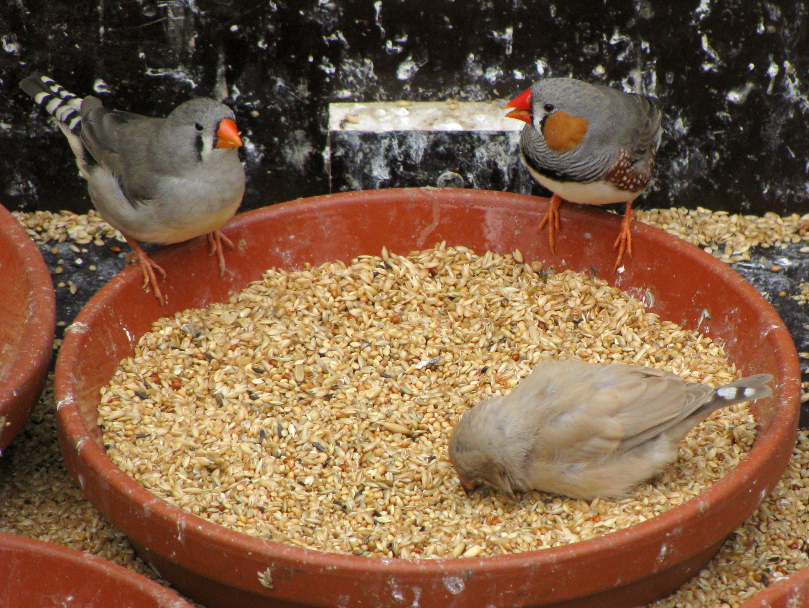 Pairi Daiza